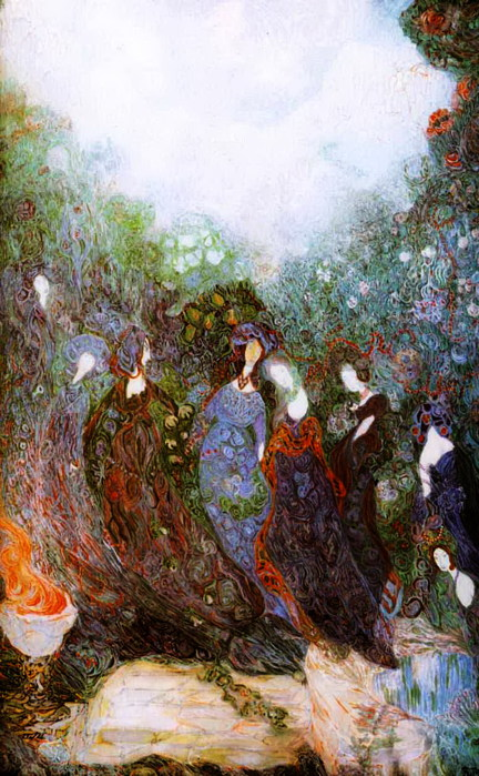 картина Талем